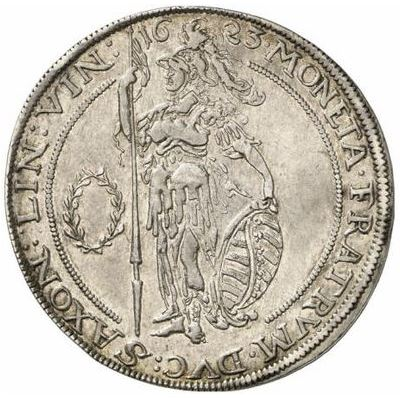 Taler 1623, Münzstätte Weimar